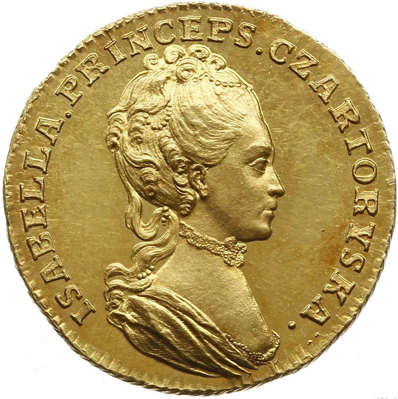 Izabela z Flemingów Czartoryska